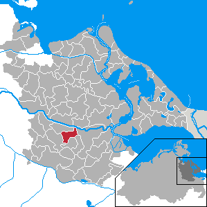 Postlow, Landkreis Ostvorpommern, Mecklenburg-Vorpommern